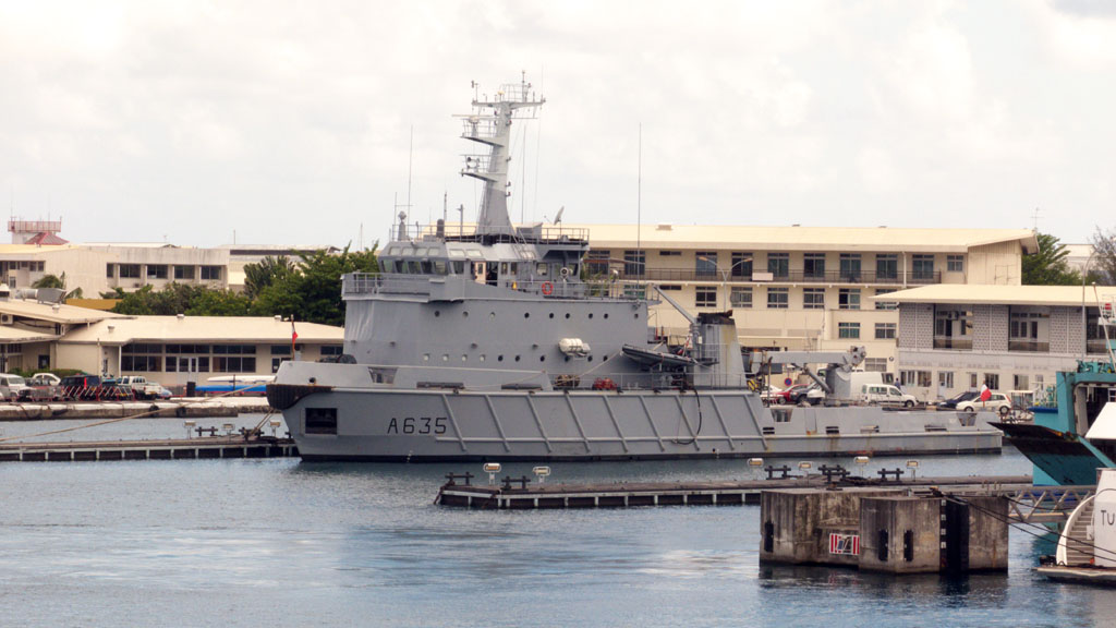 Der Hochseeschlepper A635 Revi der französischen Marine im Hafen von Papeete (Tahiti)